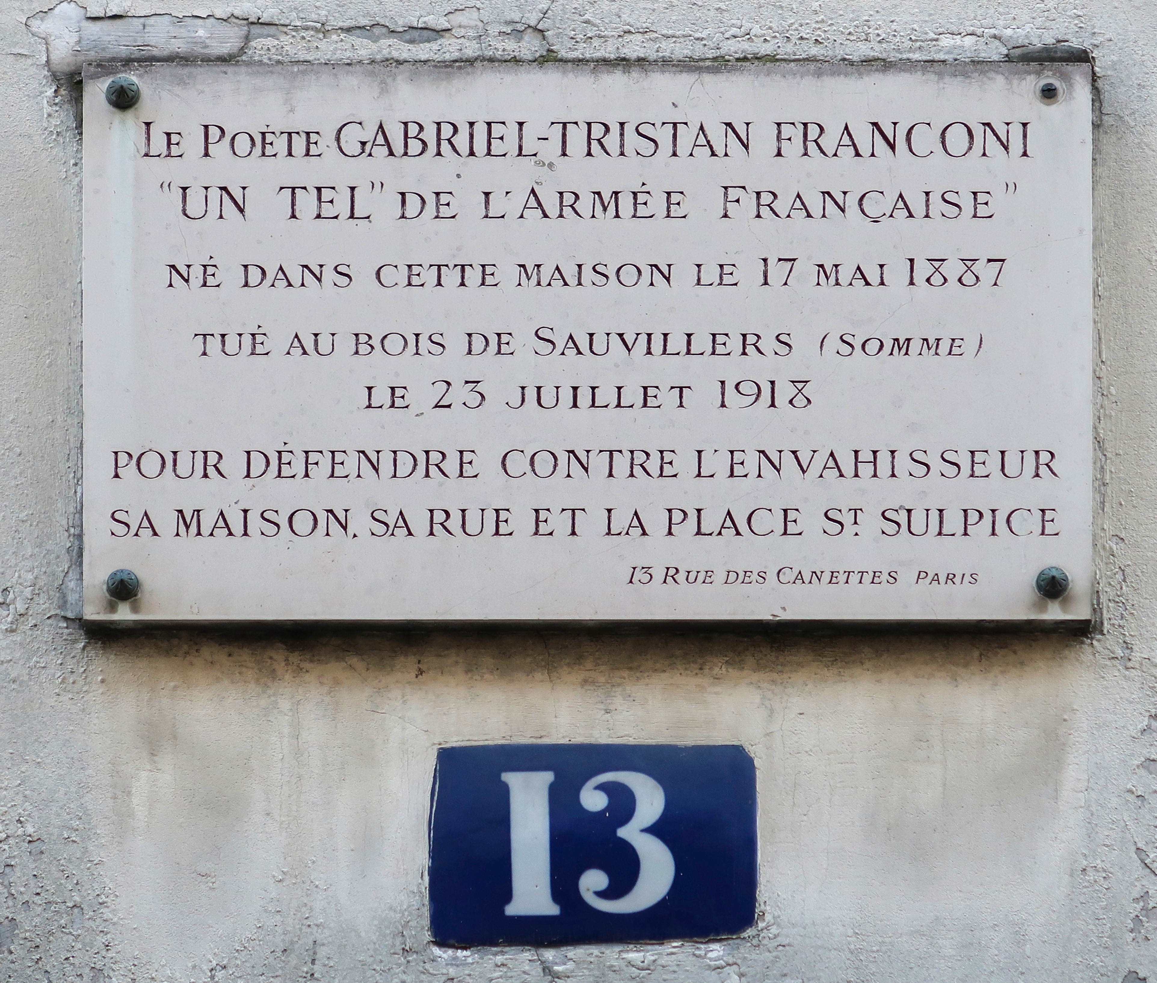 Plaque en hommage à Gabriel-Tristan Franconi, 13 rue des Canettes (Paris, 6e).